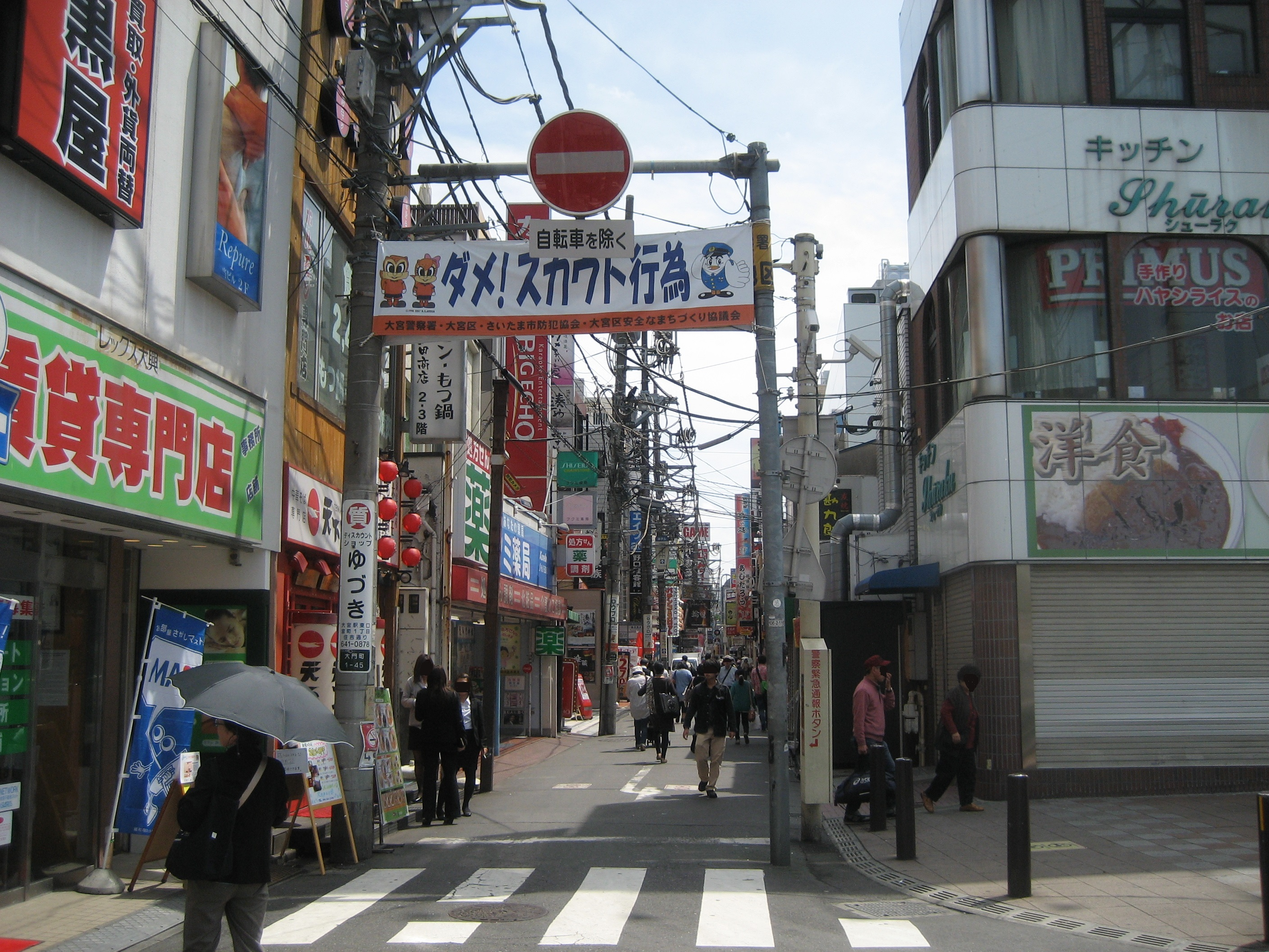 さいたま市大宮区にある南銀座（大宮駅東口広場南側付近）